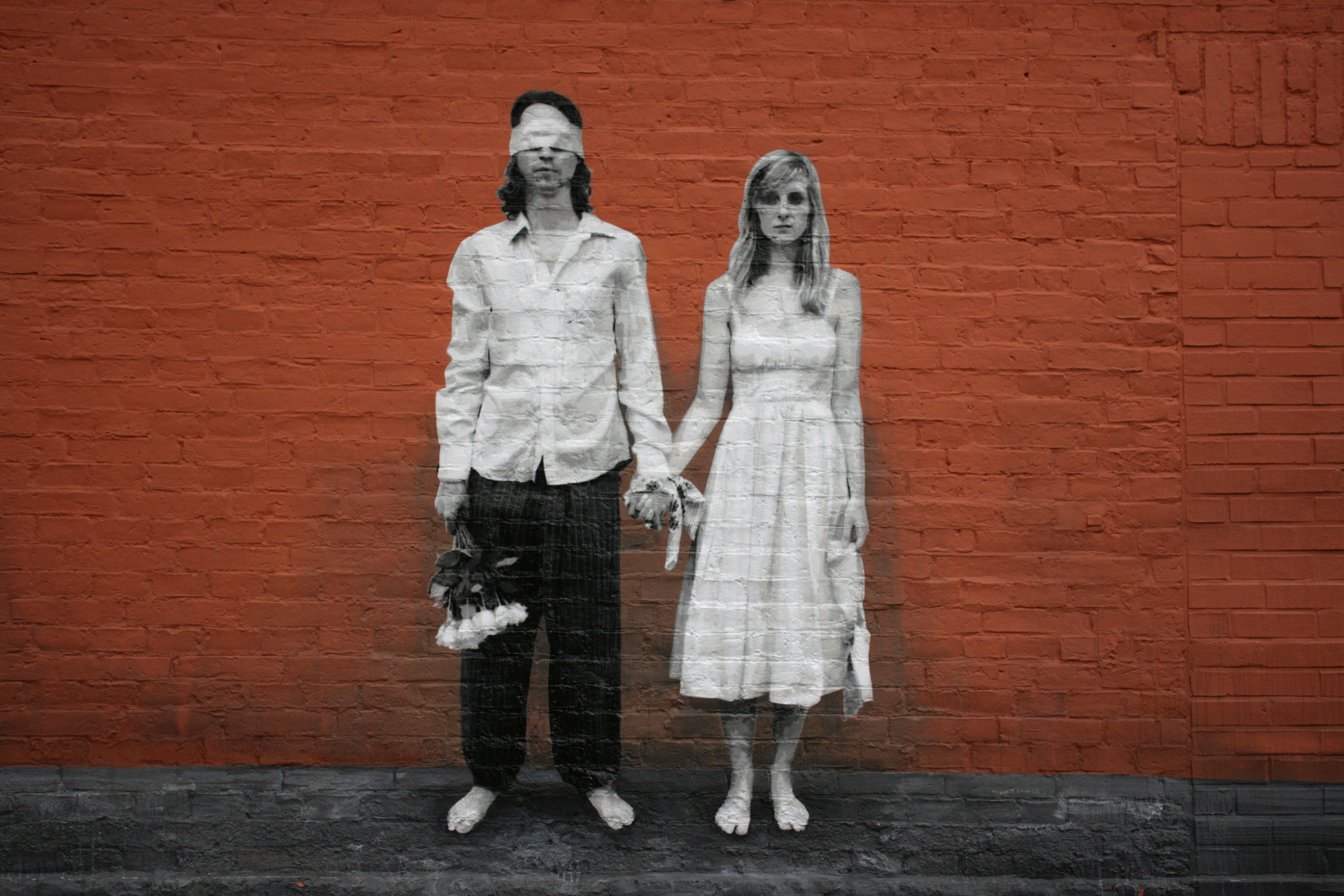 Graffiti „To die for“ von Boxi an der Salzstraße in Lüneburg; 2009 im Rahmen der ARTotale entstanden. Motiv nach einem Zeitungsbericht: Ein afghanisches Paar versuchte in den benachbarten Iran zu fliehen, um entgegen dem Wunsche der Eltern zu heiraten. Doch die Flucht missglückte. Verraten durch die Eltern, wurden sie öffentlich von den Taliban hingerichtet.